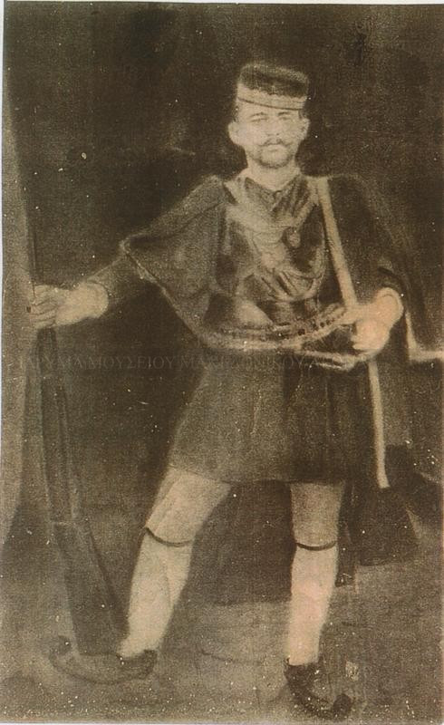 Йоанис Колицас.